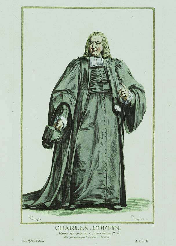 Gravure publiée en 1780 par le graveur Pierre Duflos. gravure à l'eau-forte aquarellée sur papier vergé encadrement liseré doré In-folio Dimensions de la feuille : 367 x 234. Charles Coffin (1676-1749) figure en pied de face, portant l'habit ecclésiatique noir orné d'un rabat blanc. Le bas des manches et les franges de l'écharpe sont blancs. Il tient son bonnet dans sa main gauche. Sous la gravure : " Touzé - Duflos" au-dessous du tr. c. : "Charles Coffin / Maître Es-arts de l'Université de Paris" Tiré des Estampes du Cabinet du Roy à gauche : A paris chez Duflos le jeune à droite : Avec Privilège du Roi (A.P.D.R.) Cette estampe fait partie du "Recueil d'estampes représentant les grades, les rangs et les dignités, suivant la coutume de toutes les nations existantes" A Paris chez Duflos le jeune, graveur, Cloïtre Saint Benoît, près de la rue Saint-Jacques, 1780. Petit in-folio. IFF, graveurs du XVIIIe. p.109